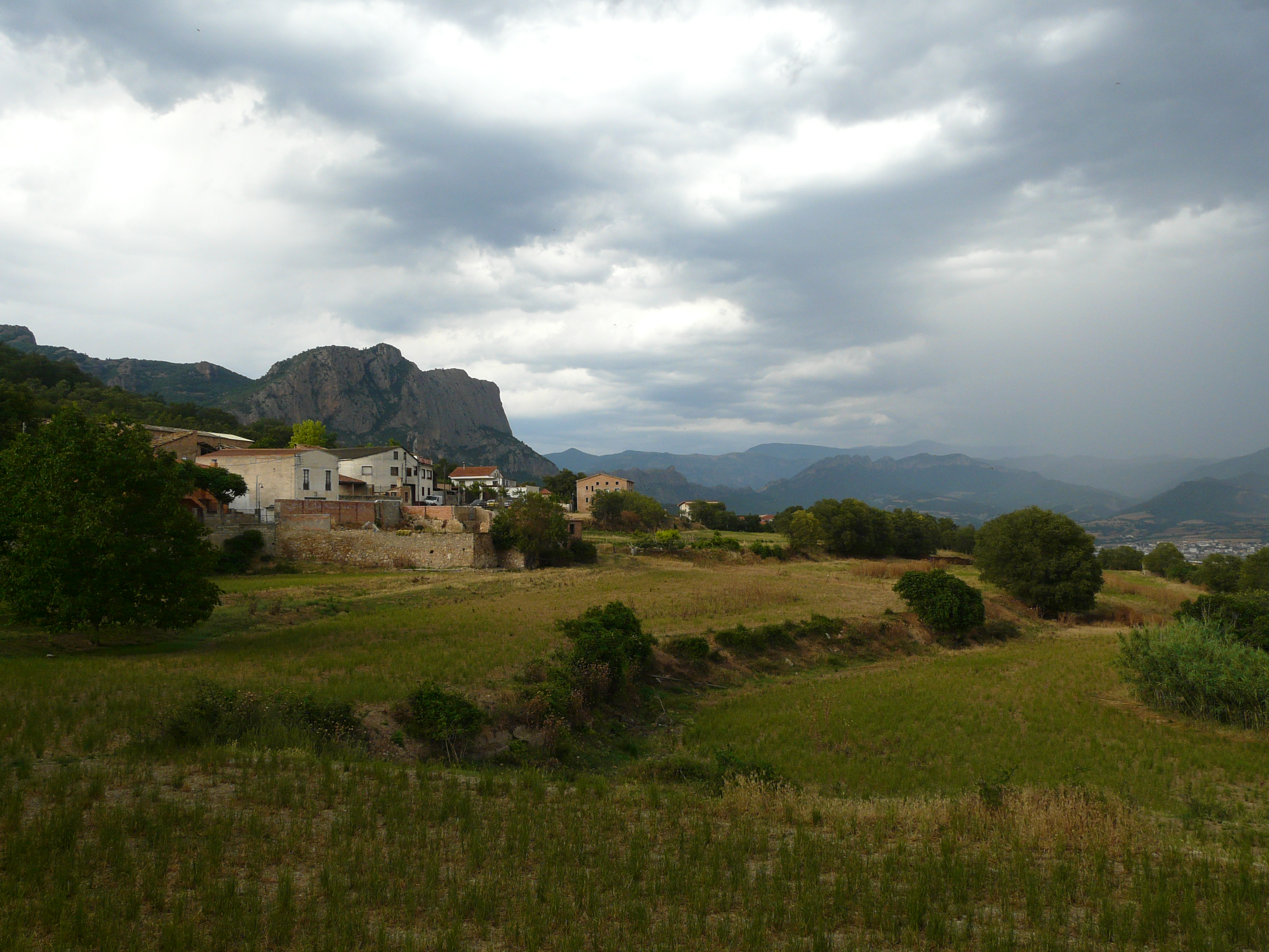 Serra d'Aubenç i Roc de Cogul (Alt Urgell) (Peramola, Coll de Nargó, Bassella). This is a a photo of a natural area in Catalonia, Spain, with id: ES510175 Object location42° 06′ 00″ N, 1° 13′ 48″ E